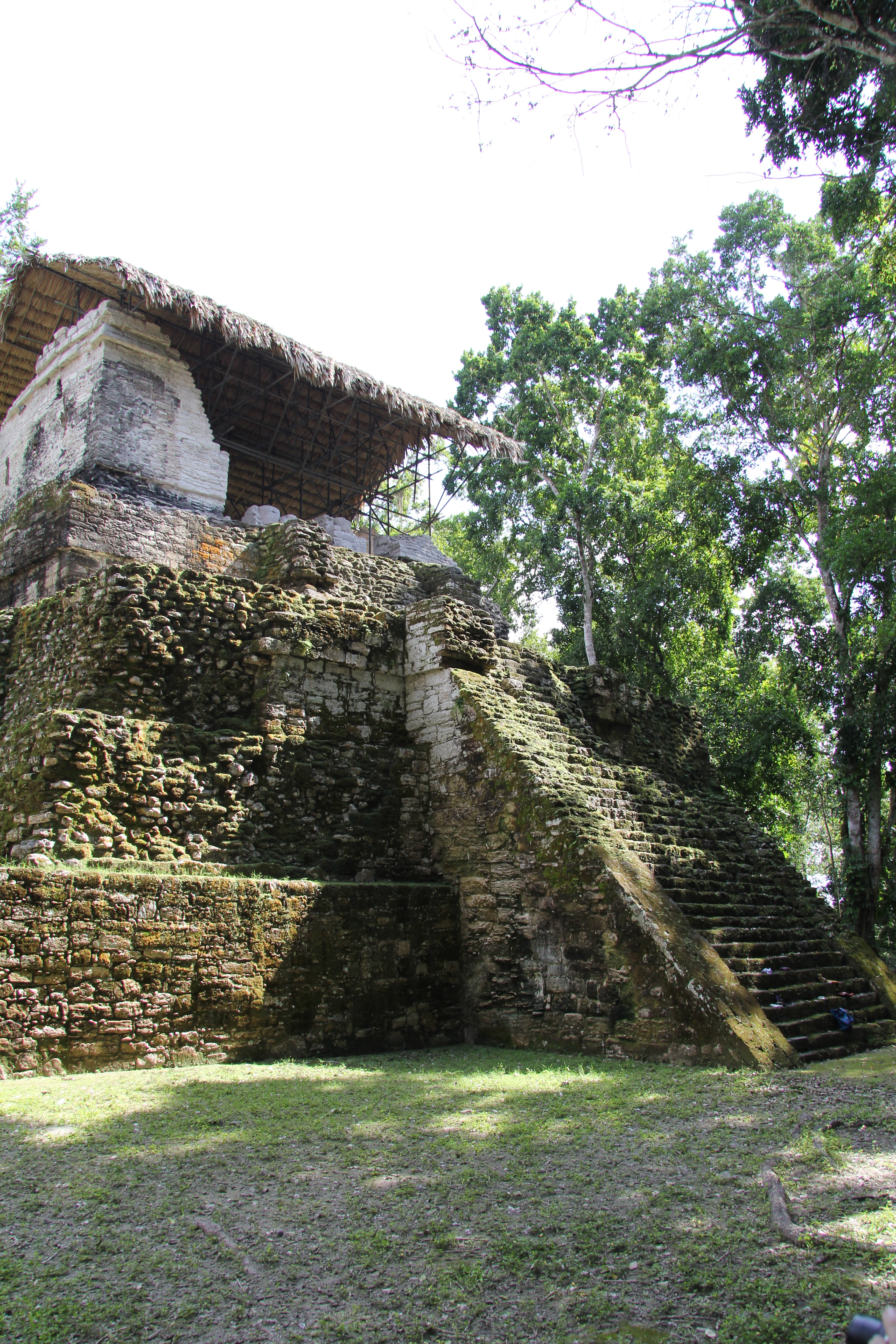 Ruinas mayas en la isla Topoxté, Parque Yaxhá Nakum Naranjo, Reserva de la Biosfera Maya, Petén, Guatemala